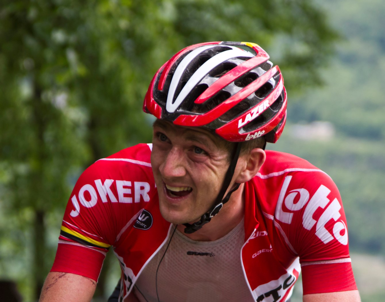 116 vdb